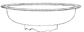 Zeichnung des Querschnittes der Sergiosschale